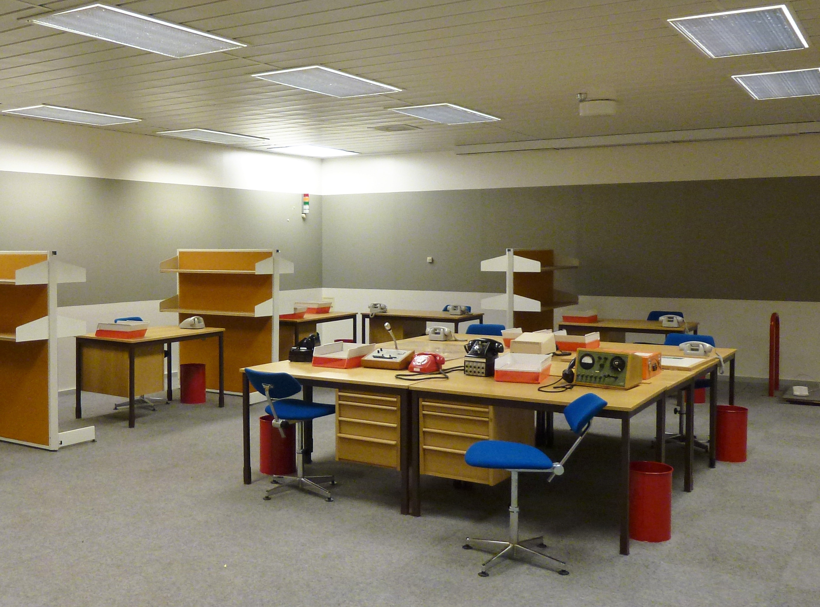 Ledningscentralen "Vargen" i Huddinge, ledningscentral